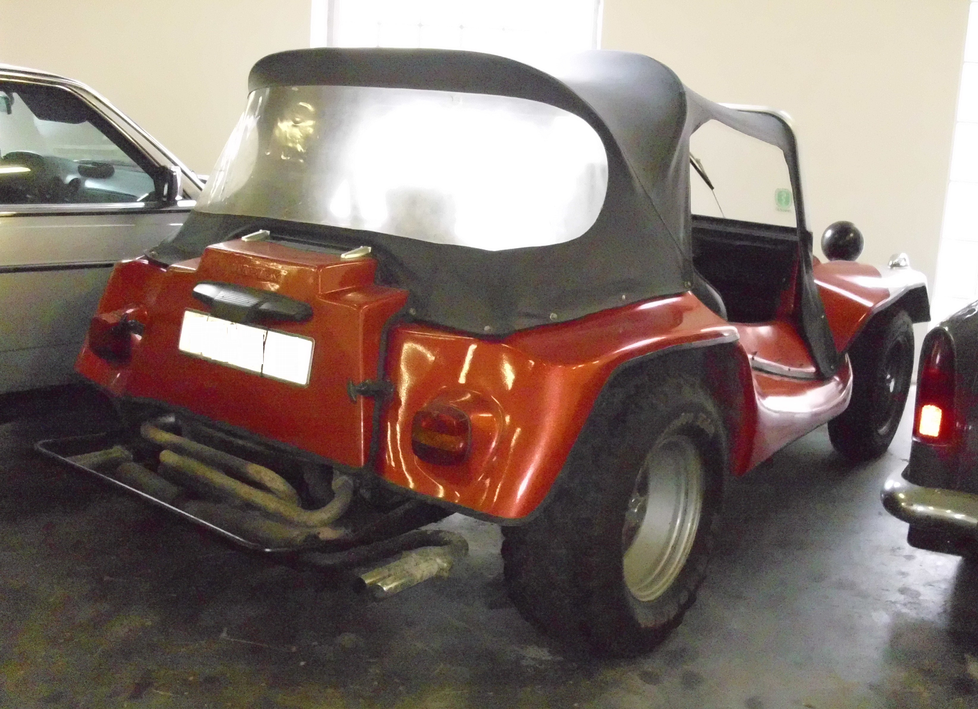 Bieber Maplex Buggy 1978